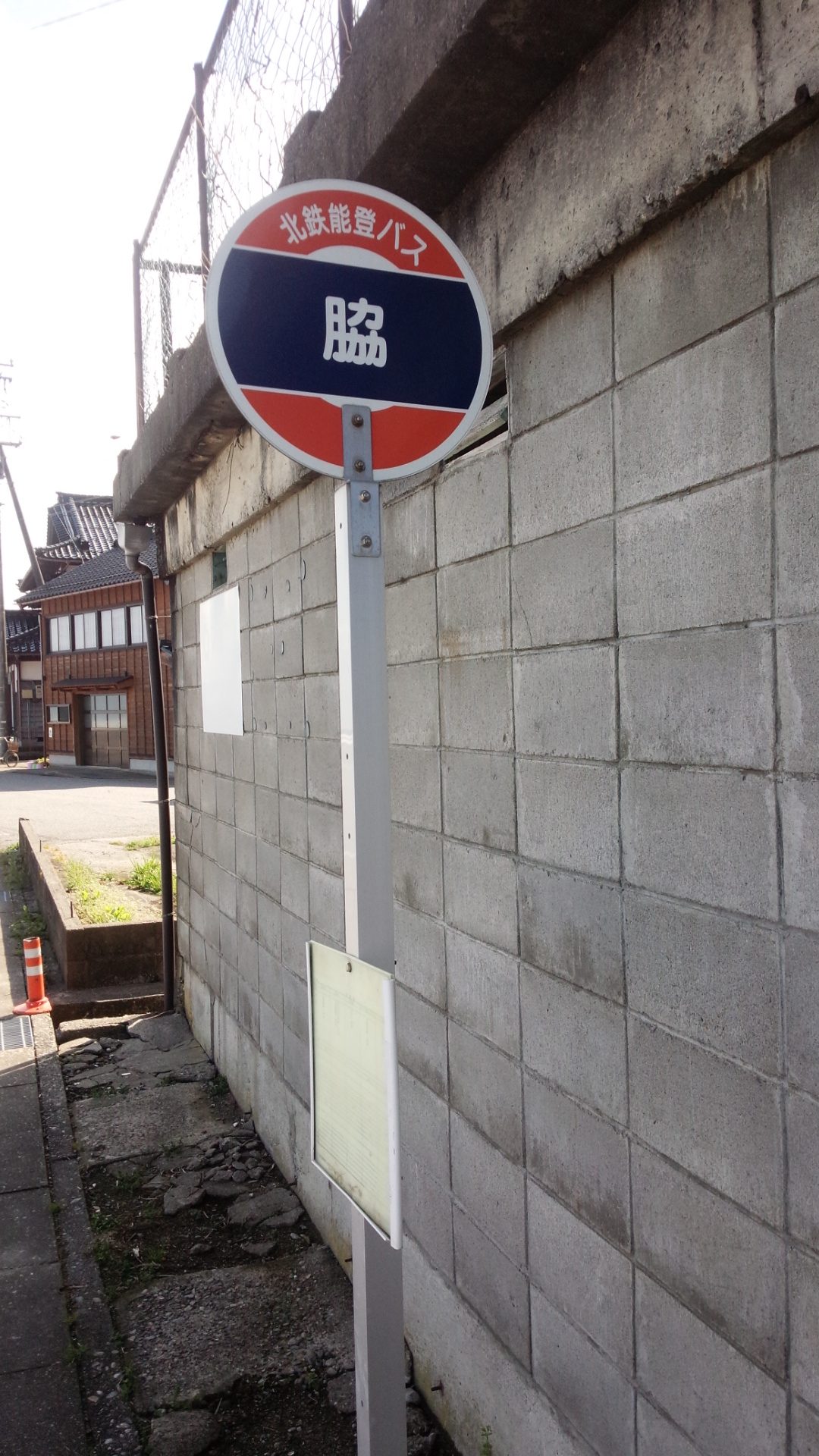 氷見市、脇バス亭